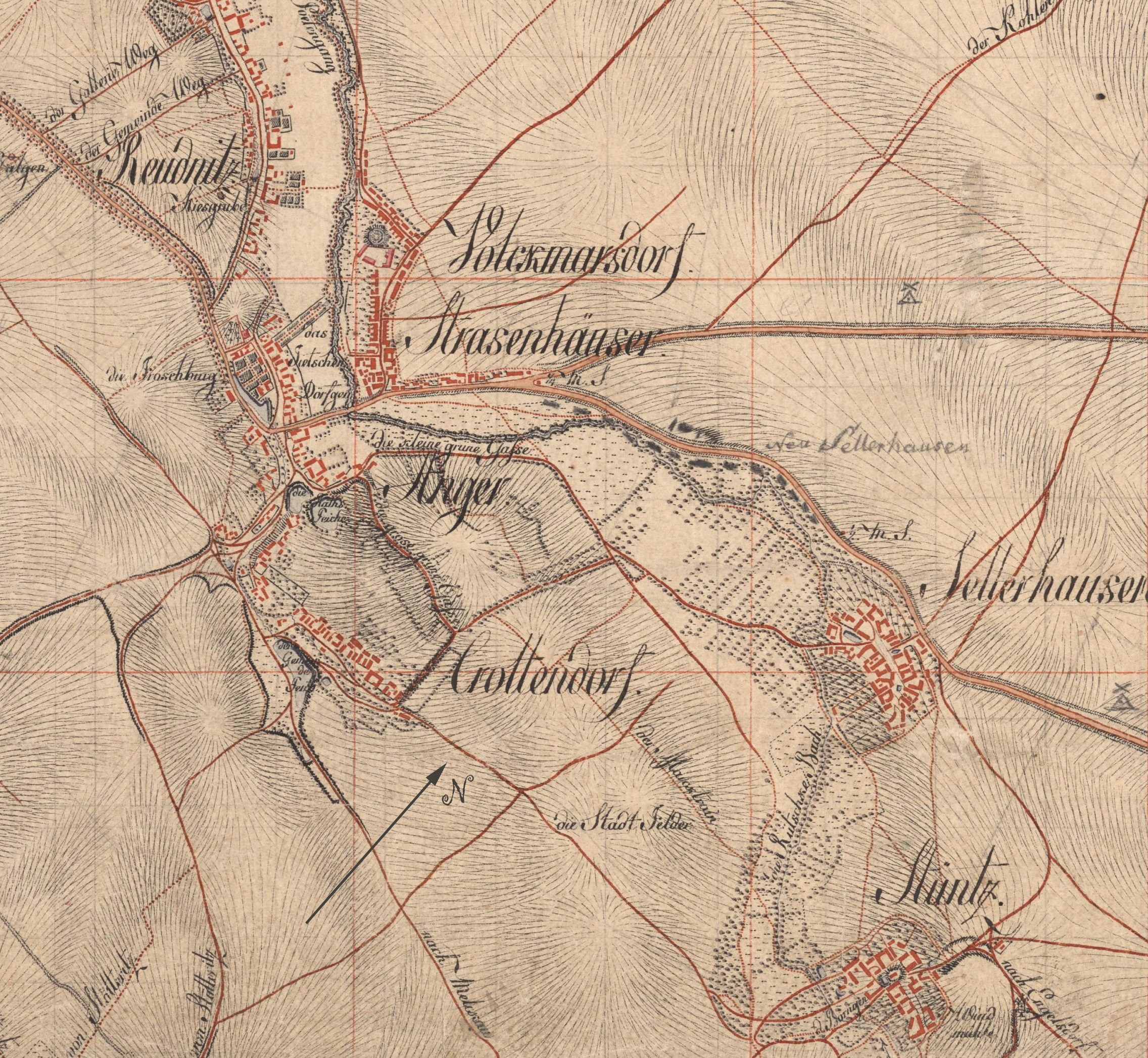 Anger und Crottendorf auf einer Karte von 1802 (Ausschnitt aus Meilenblätter von Sachsen 1780-1806)